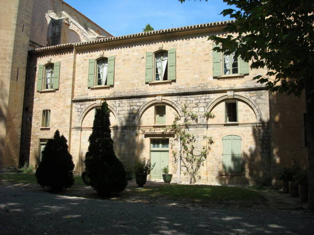 Aile ouest de l'abbaye de Valmagne, vue de l'extérieur de l'abbaye